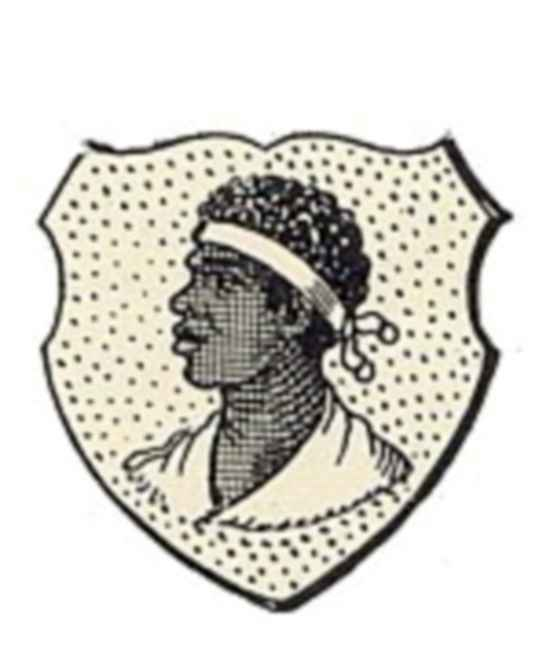 Familienwappen Mohr von Zernez (adeliges Aemtergeschlecht in Graubünden) Blasonierung:In Gold Mohrenkopf mit silberner Stirnbinde und silbernem Kragen.